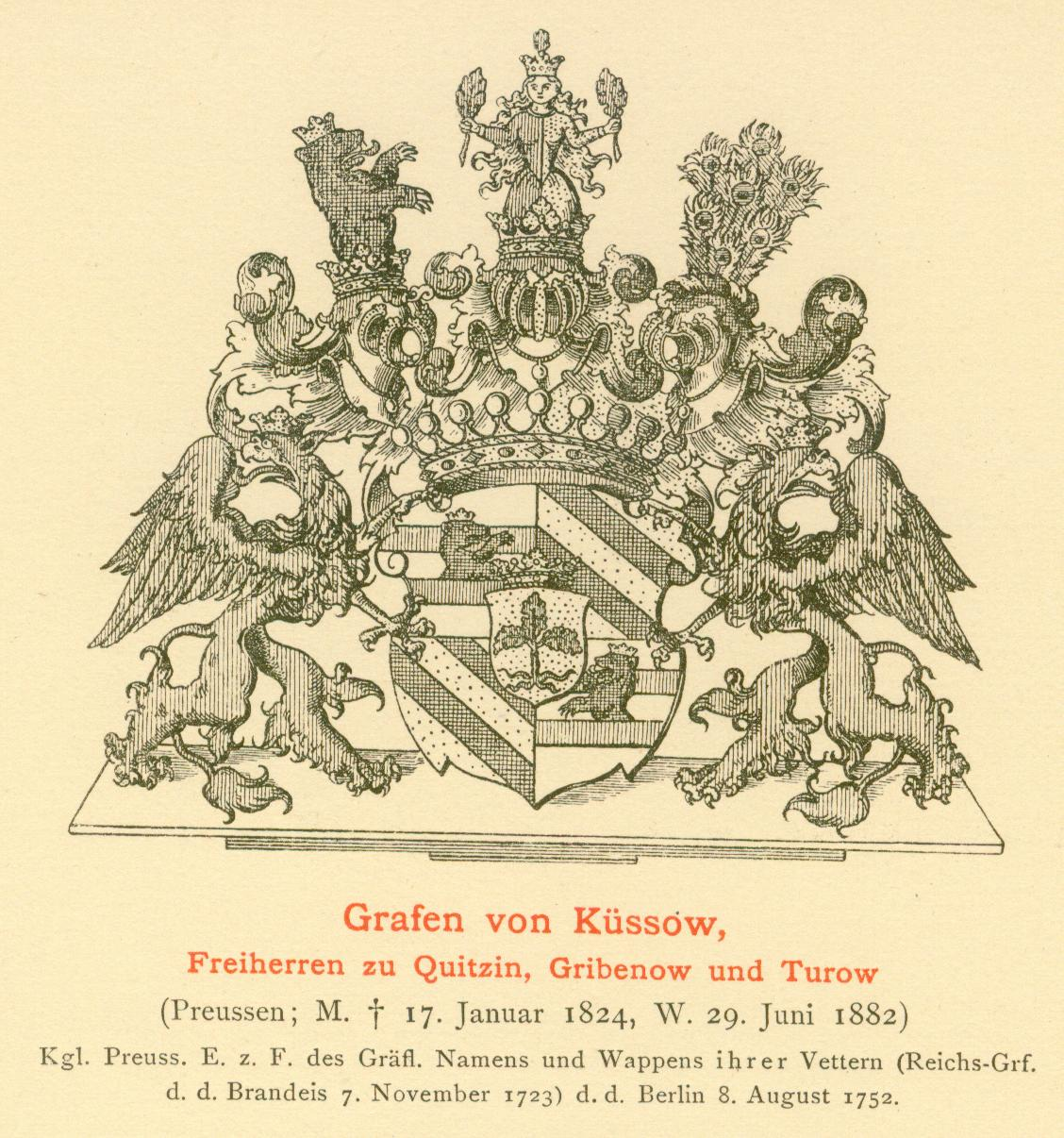 Kussow